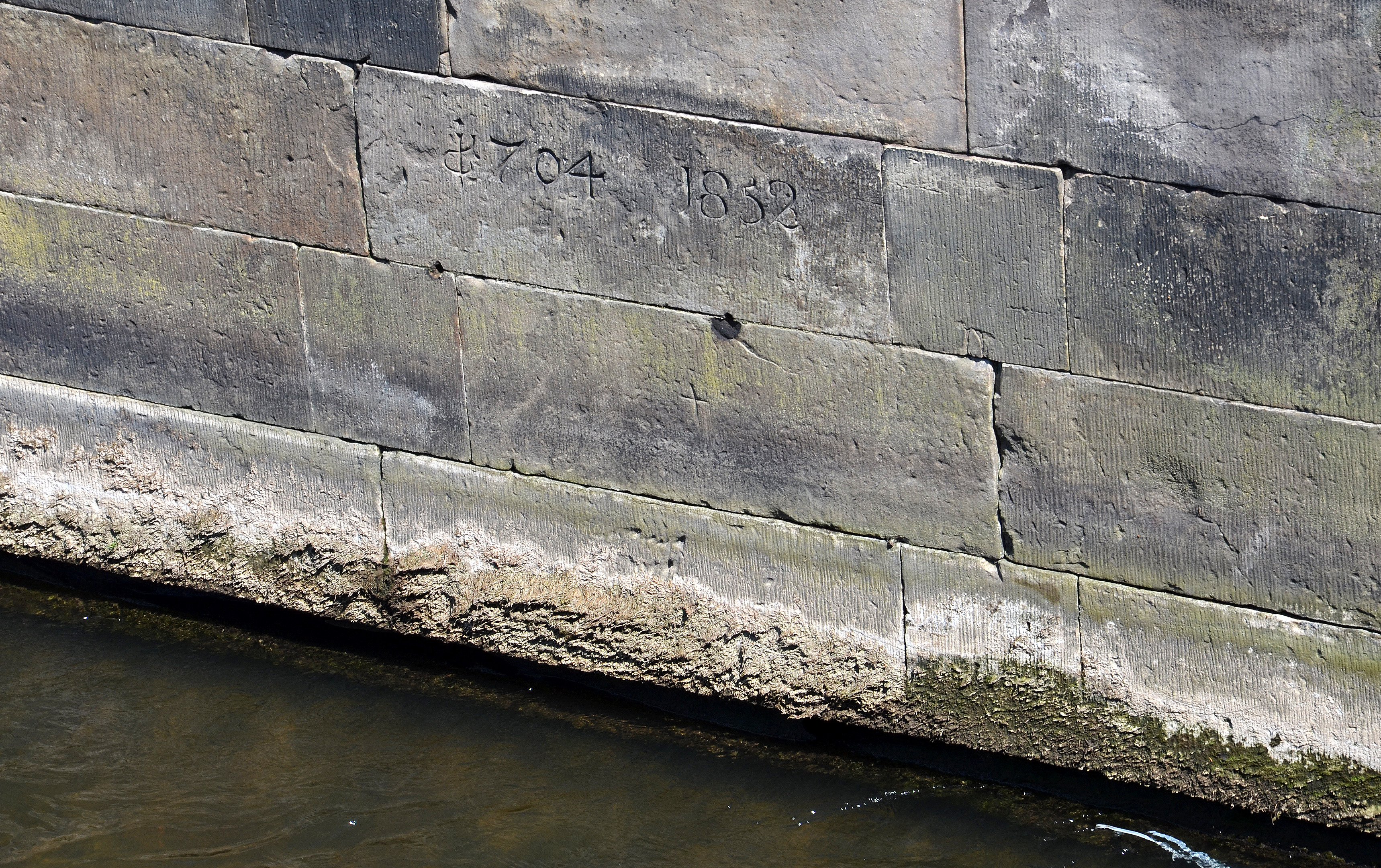 An der Uferbefestigung der heutigen Rademachertreppe in Hannover an der Leine findet sich in Höhe der Leintorbrücke eine Inschrift mit den Jahreszahlen 1704 und 1852. Die Ziffern sind teilweise mit einer hier noch nicht identifizierten Künstlersignatur (?) versehen - die Zeichen der damaligen Baumeister ...?